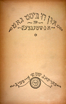 Abraham Nochem Stenzel Un du bist Got Leipzig Shemesh 1924 Titel